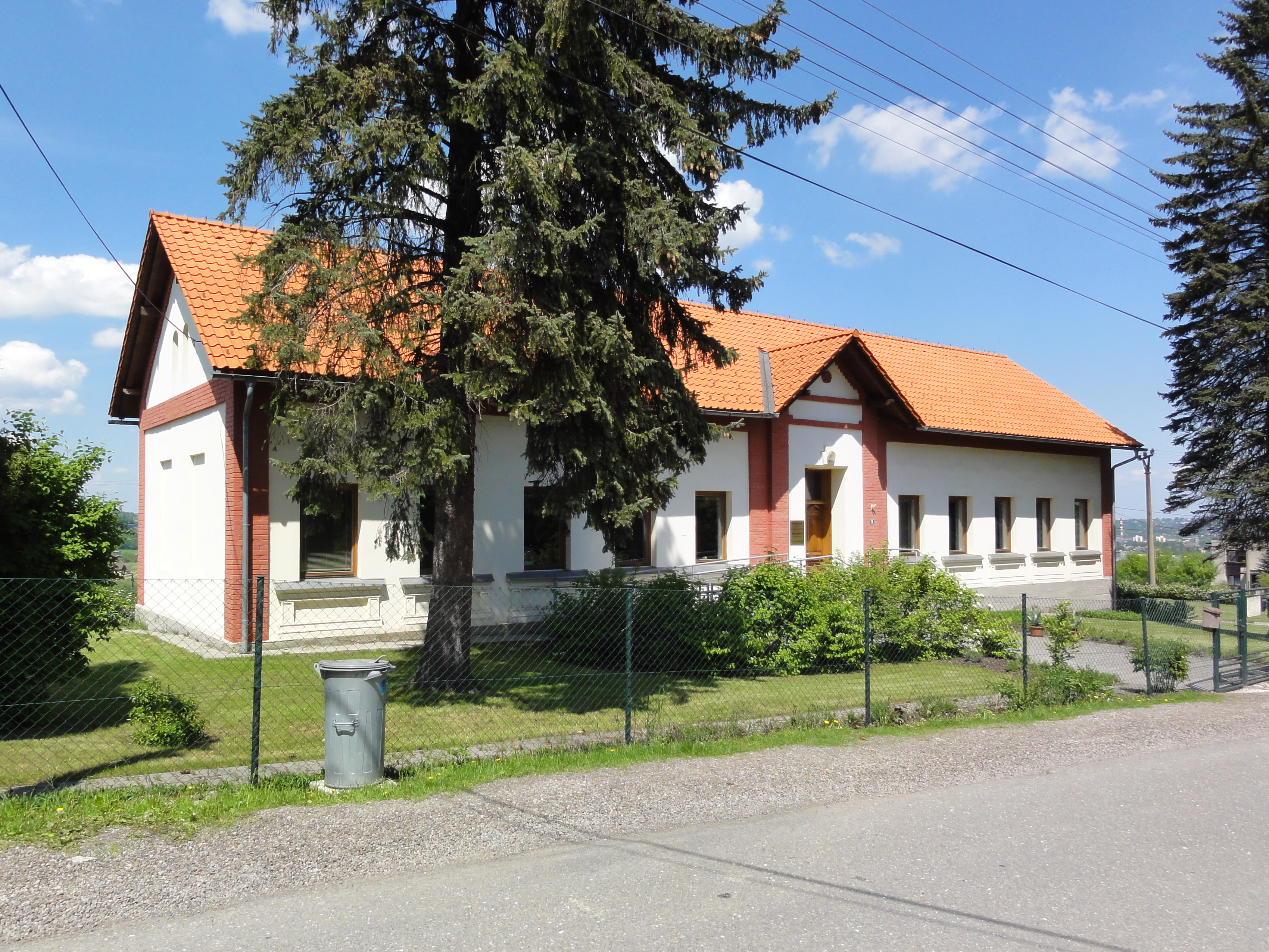 Czeski Cieszyn, Dolny Żuków, ul. Pod Dzwonek, biblioteka